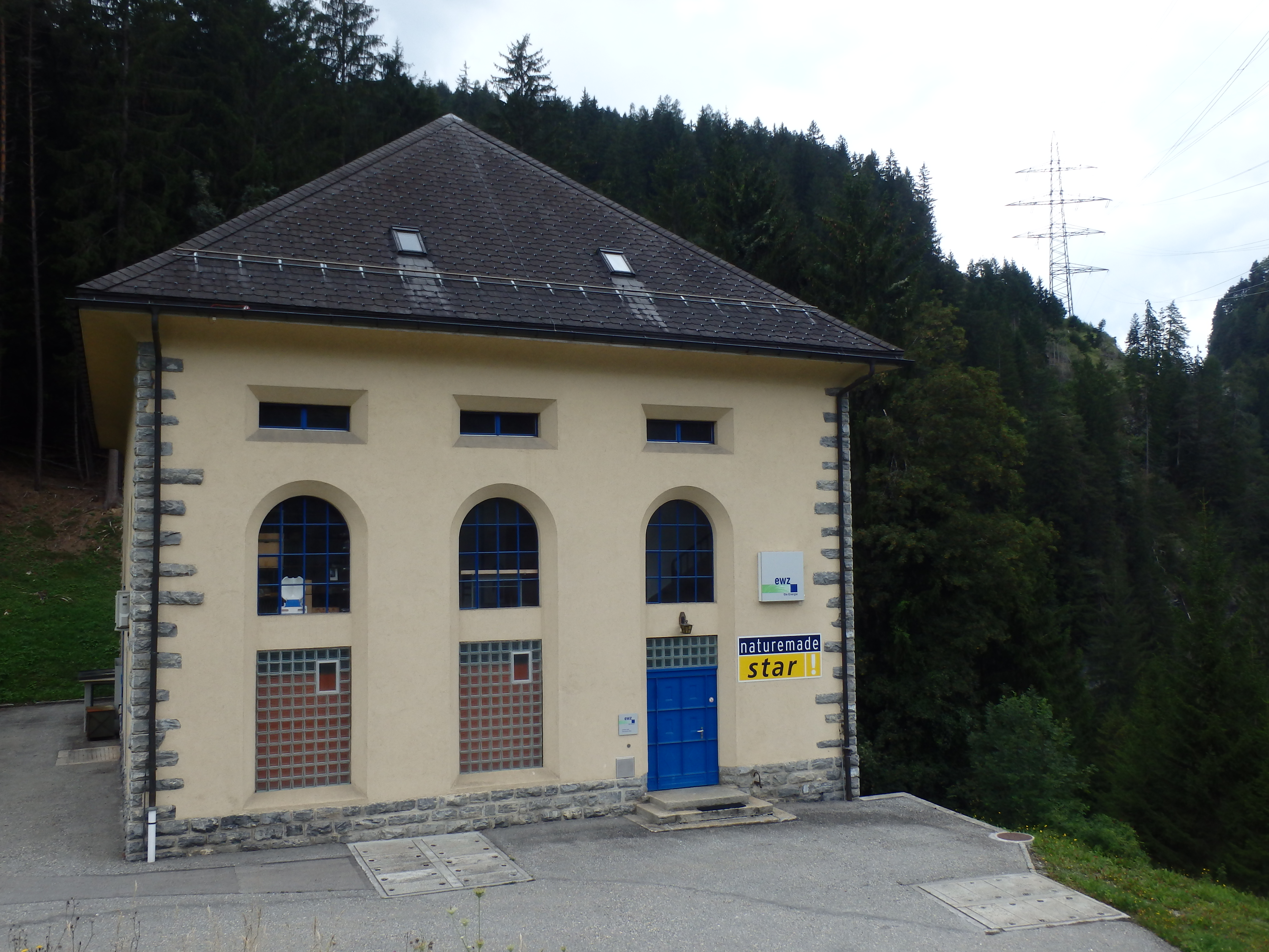 1917 bis 1919 baute das Elektrizitätswerk der Stadt Zürich (ewz) ein kleines Kraftwerk in Solis, welches das Wasser vom Heidsee nutzt. Ursprünglich befanden sich zwei Pelton-Turbinen im Maschinensaal, welche 1953 durch eine neue Peltonturbine ersetzt wurden. Das Kraftwerk erreicht eine Turbinenleistung von 7 MW und erzeugt jährlich 23 GWh Ökostrom.